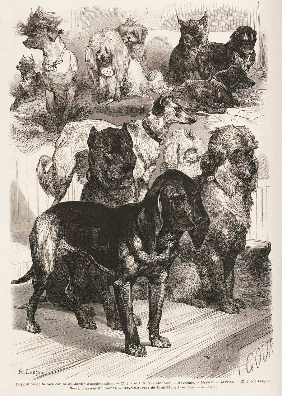 Exposition de la race canine au Jardin d'acclimatation. - Chiens nus de race chinoise. - Havanais. - Bassets. - Levrier. - Chien de berger. Besas, chasseur d'homme. - Royaliste, race de Saint-Hubert. - (Dessin de M. Lançon.)